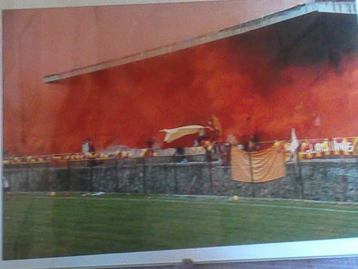 Scenografia allestita dalla tribuna centrale nella stagione 2001/2002, in occasione della vittoria del campionato.